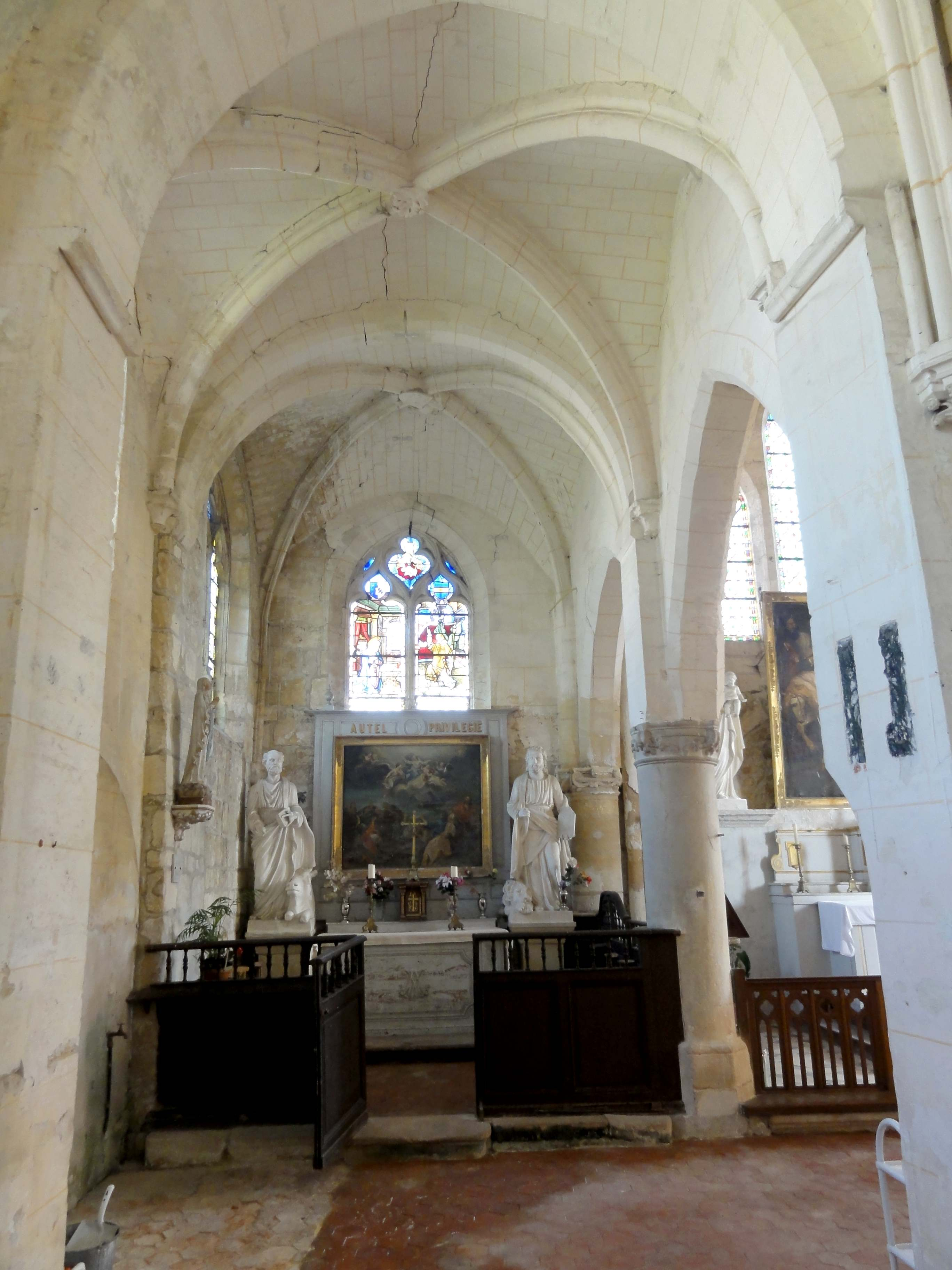 Intérieur de l'église - voir titre.